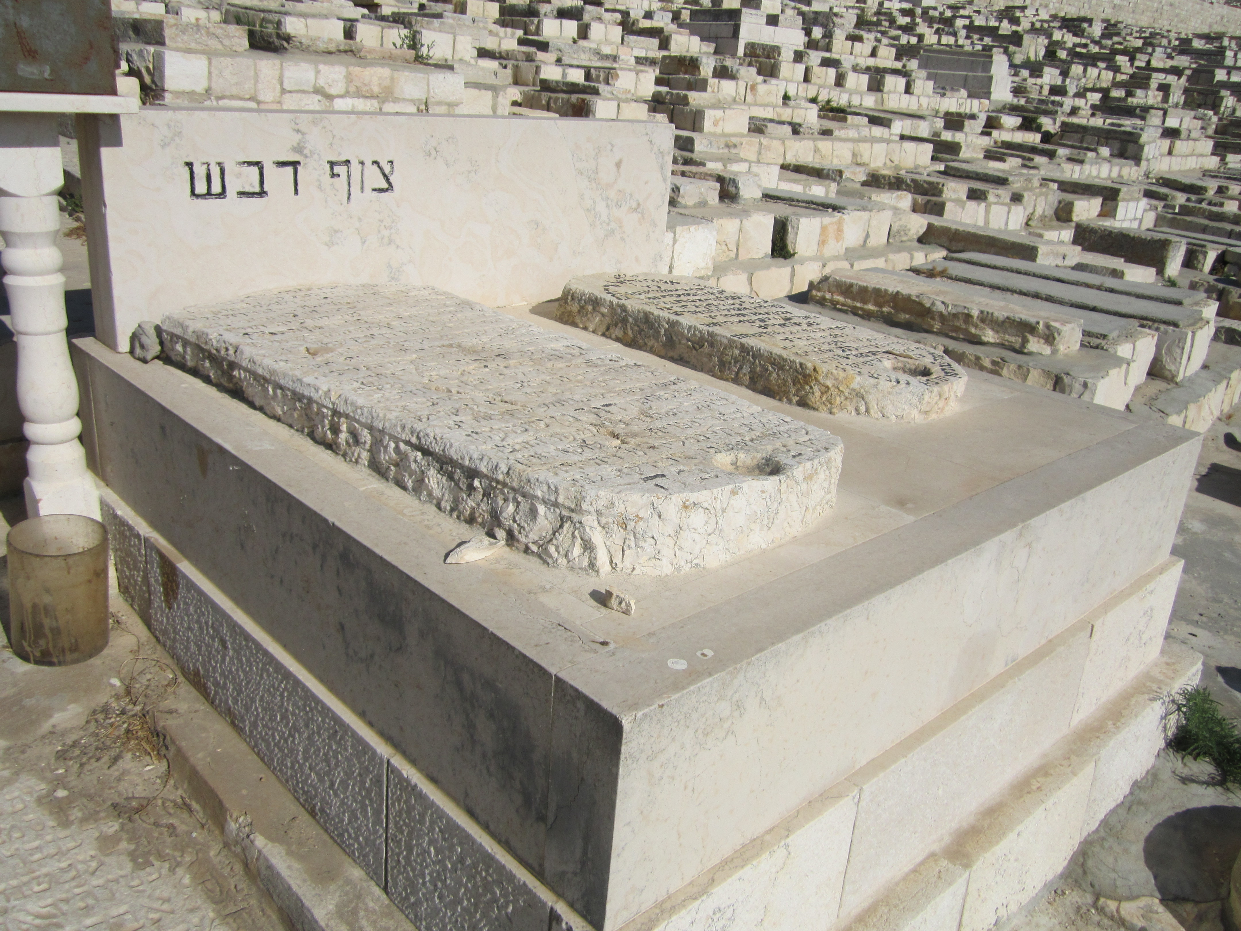 קבר הרב דוד בן שמעון - צוף דבש בהר הזיתים בירושלים